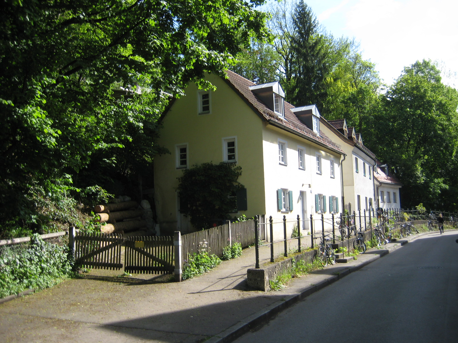 Nockherstraße in München, Stadtteil Au, Hausnummern 25 -29